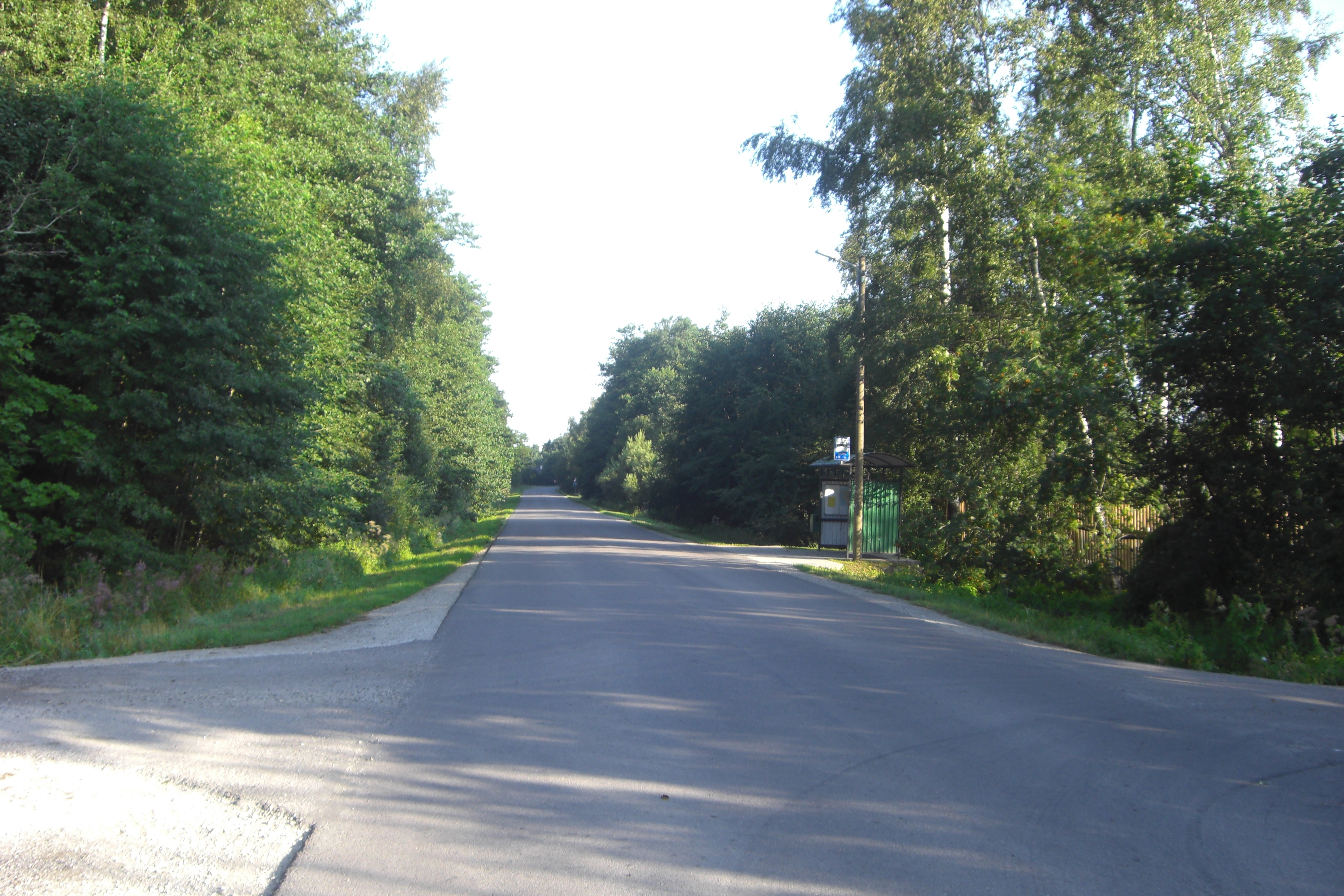 Muuga tee